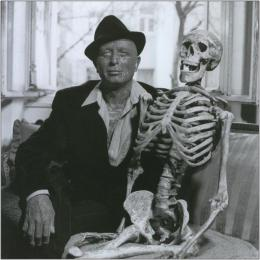 prof. JUDr. Vladimír Franz